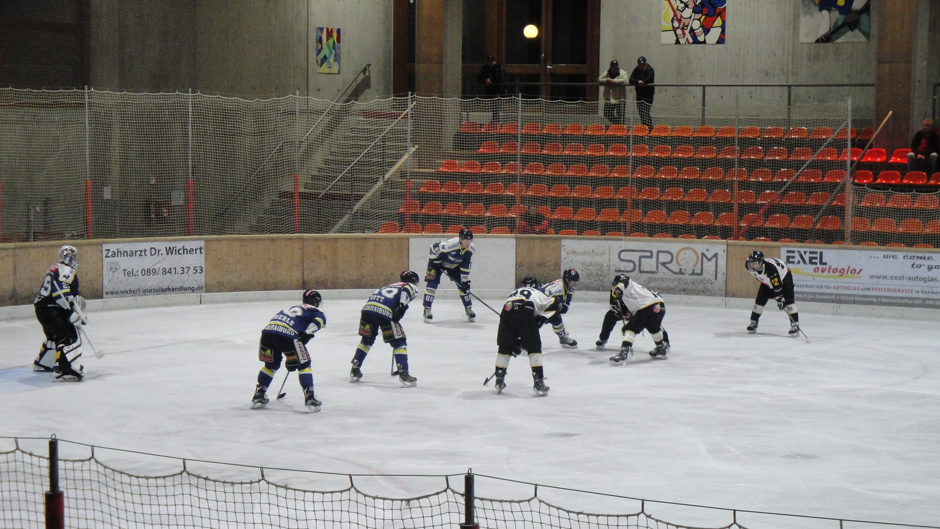 Bully während dem Spiel der Wanderers Germering - Waldkreiburg